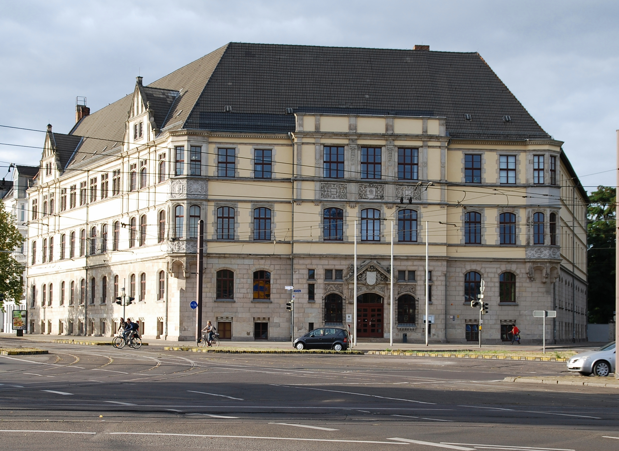 Nebenstelle des Landesverwaltungsamtes in Magdeburg am Damaschkeplatz